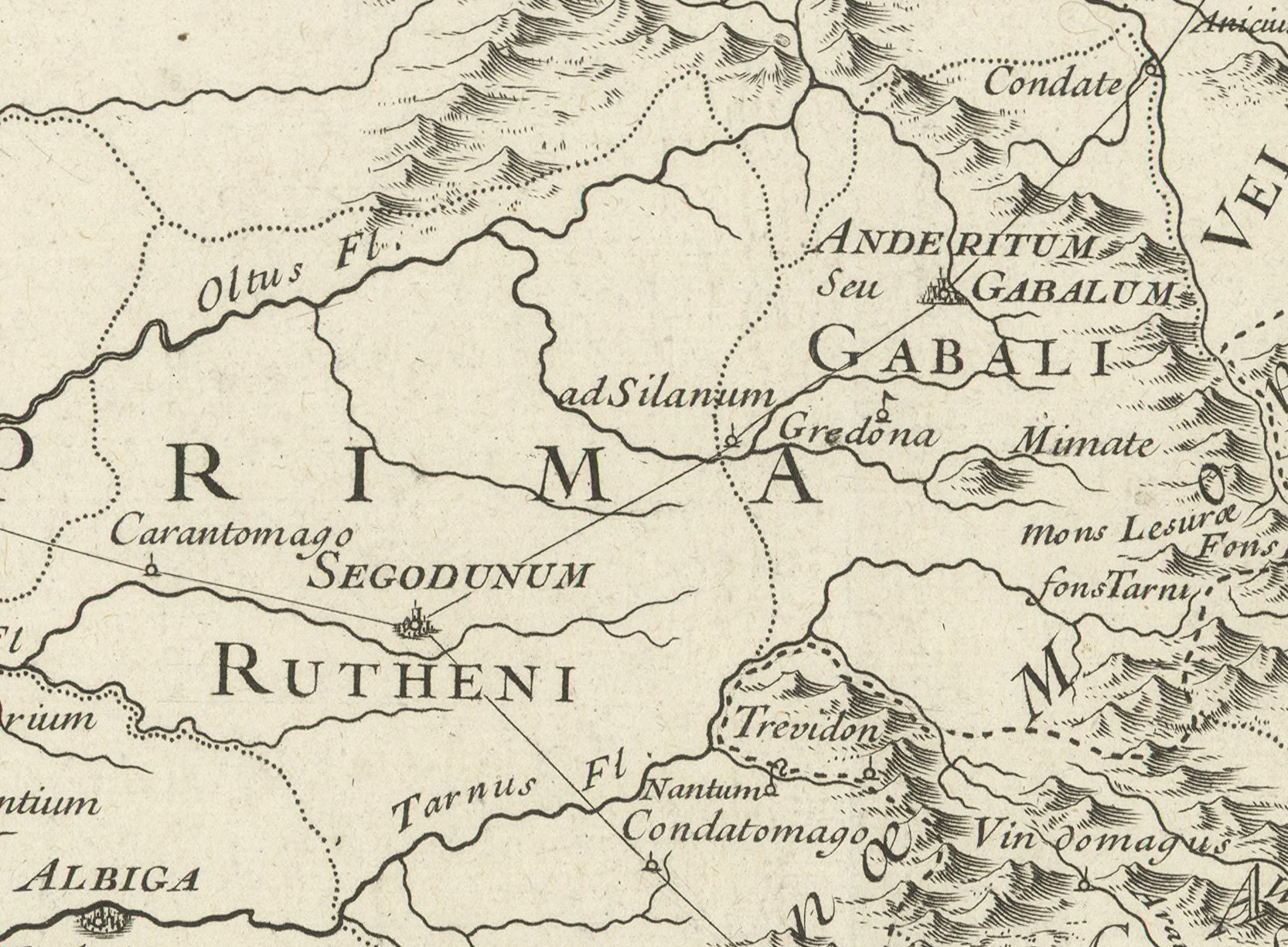 Le tronçon Andéritum Ad-Silanum representé le long de la riviere Colagne.